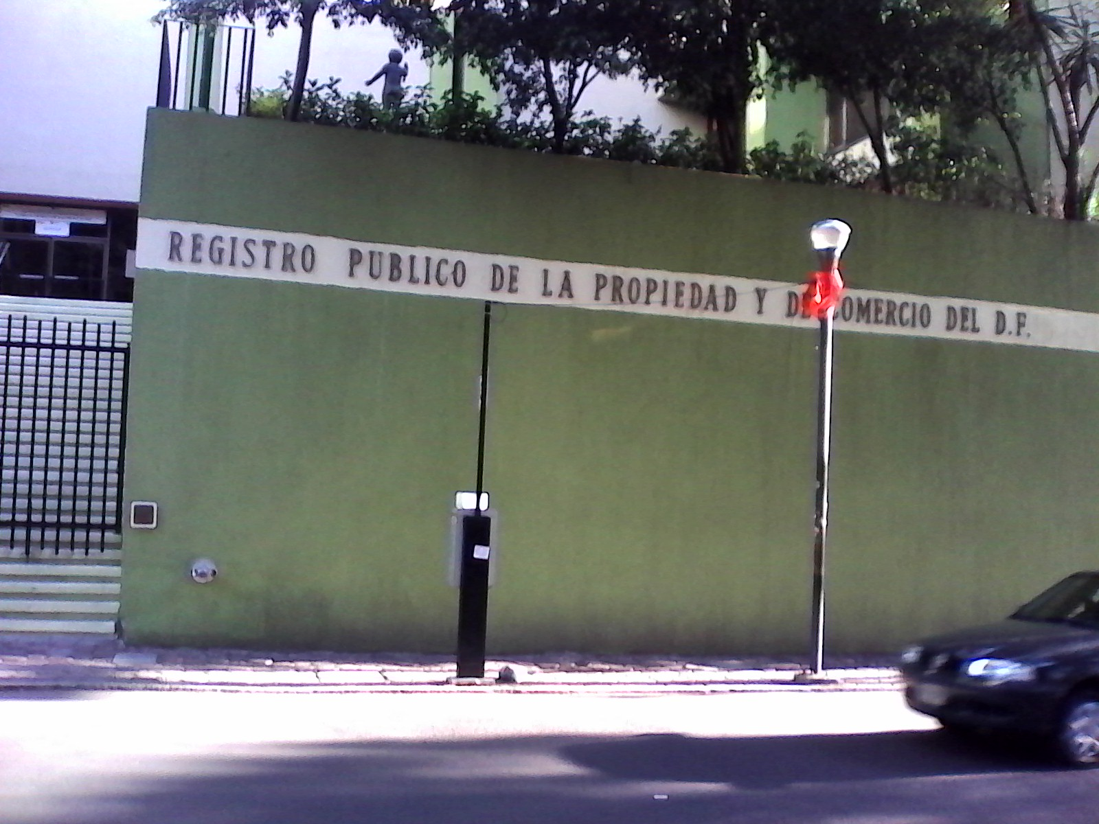 Villalongin 15, Cuauhtémoc, 06500 Ciudad de México, Distrito Federal